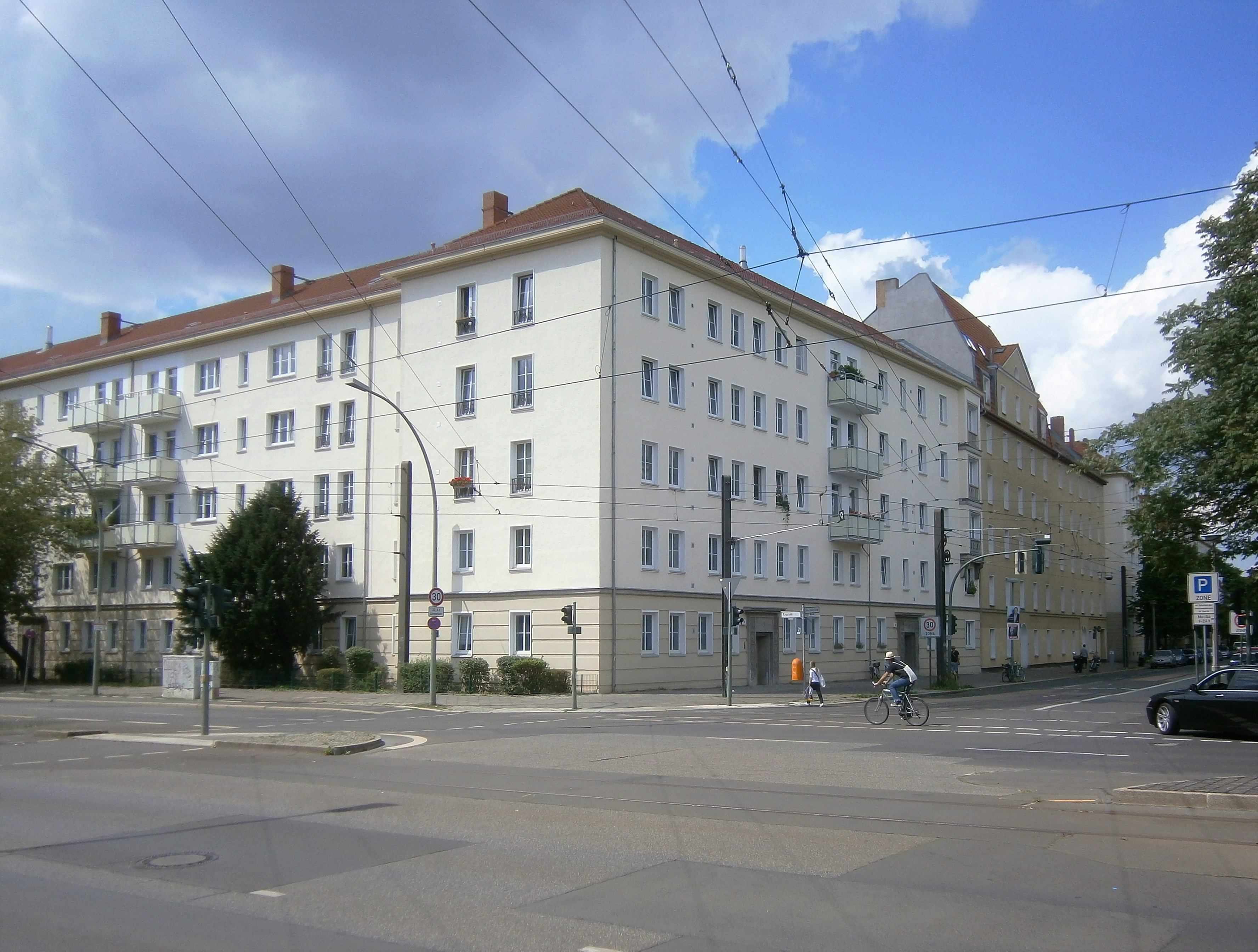 Die Grüne Stadt ist ein 1938/1939 erbautes Wohnensemble und die entsprechende Ortslage im Berliner Ortsteil Prenzlauer Berg des Bezirks Pankow. Blick auf die Ecke Kniprodestraße/ John-Schehr-Straße mit den Bauten der 1950er Jahre, die statt der vorherigen Mietskasernen an der Danziger Straße nach deren Zerstörung durch Bomben im Zweiten Weltkrieg entstanden.